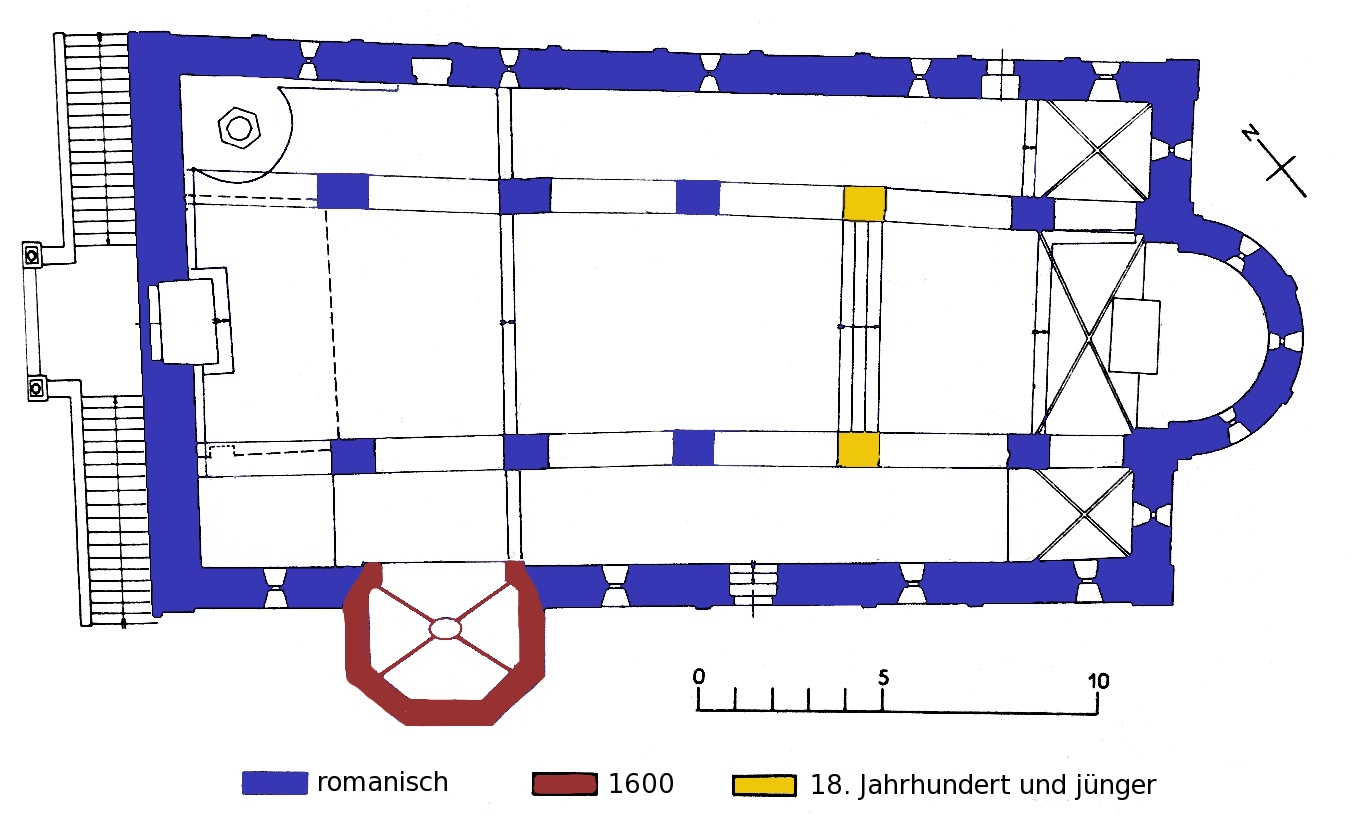 Kirche San Pietro e Paolo (Biasca) Plan